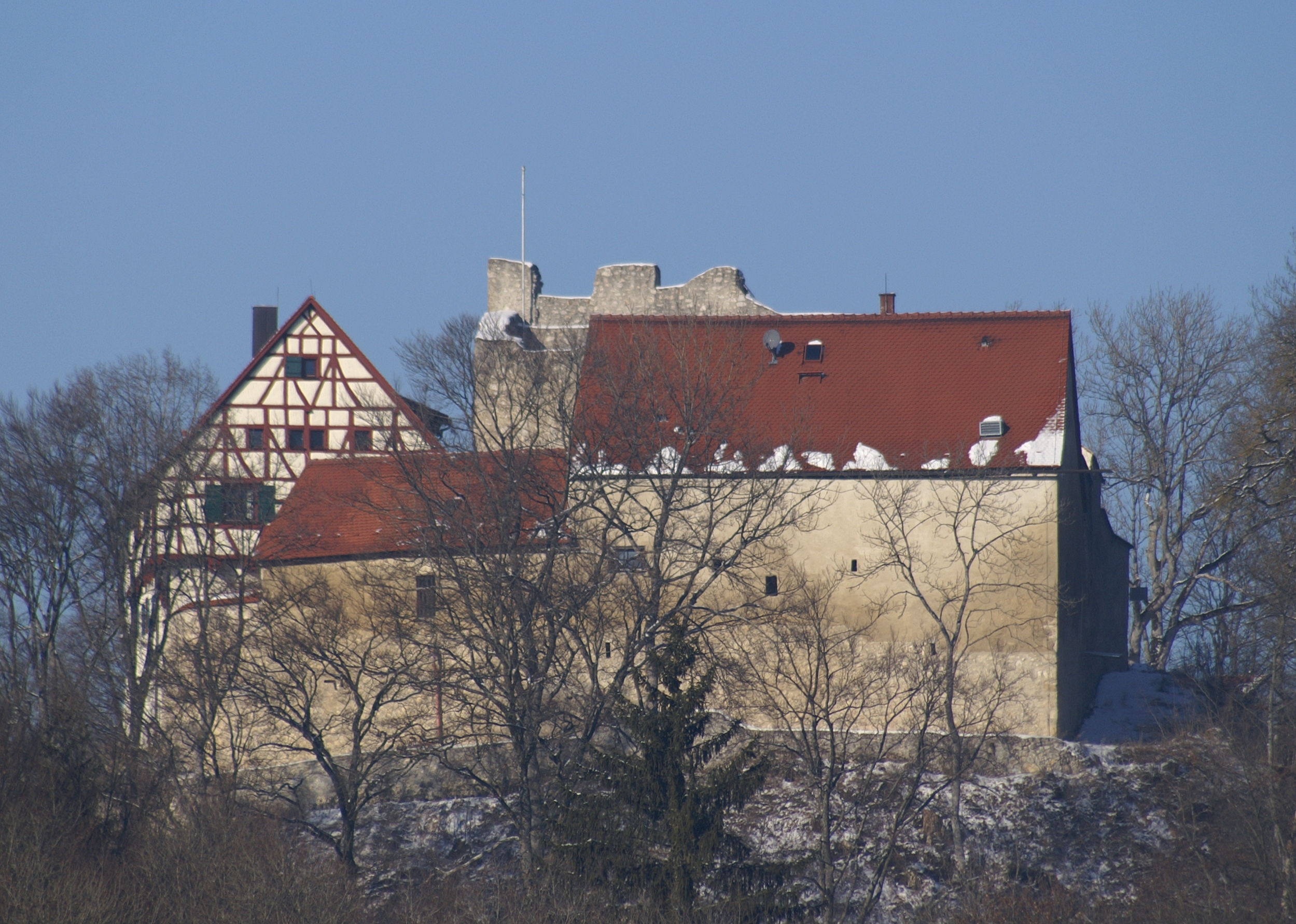 Burg Derneck über dem Großen Lautertal, Ansicht von Osten